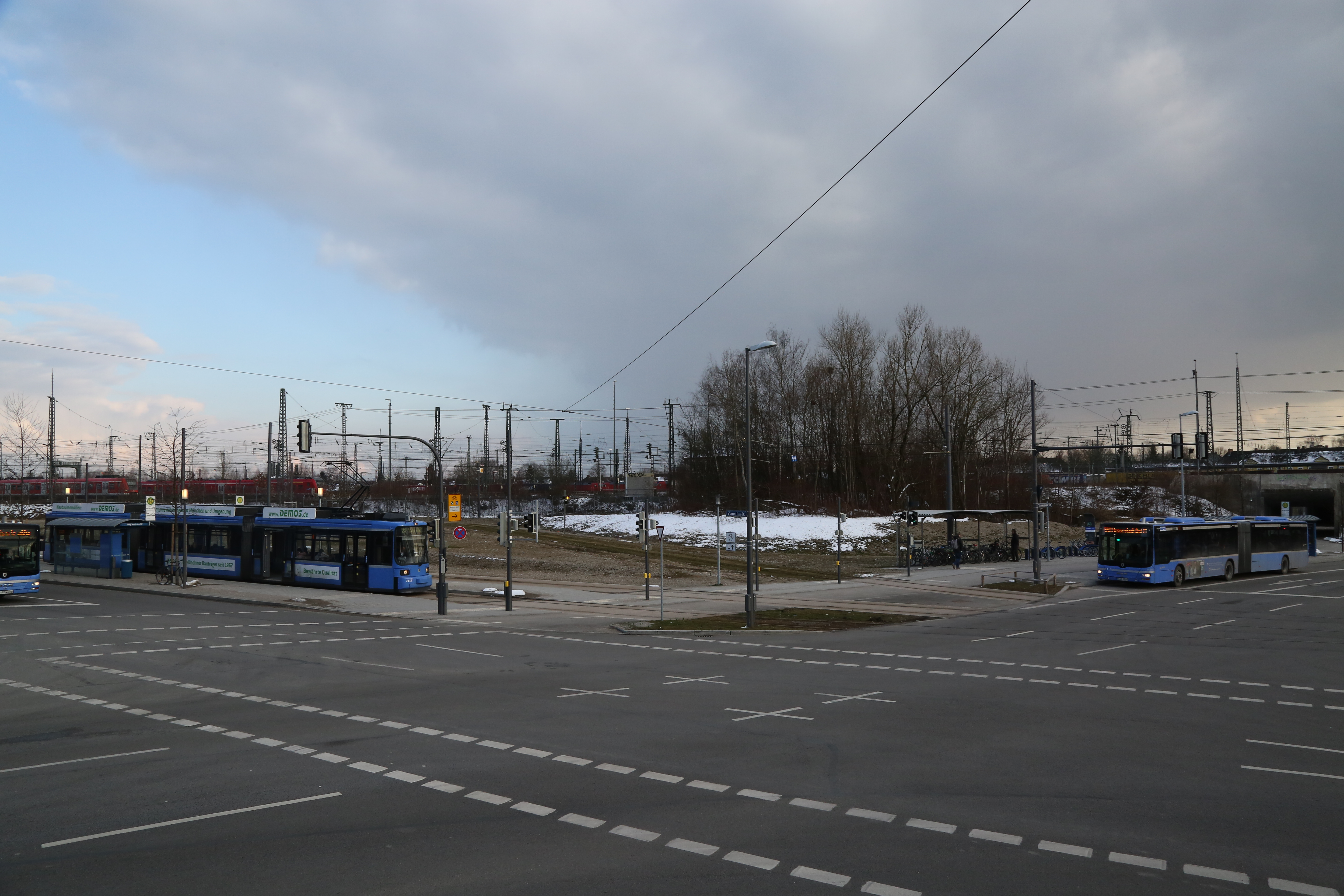 Haltepunkt Berg am Laim am 21. März 2018.